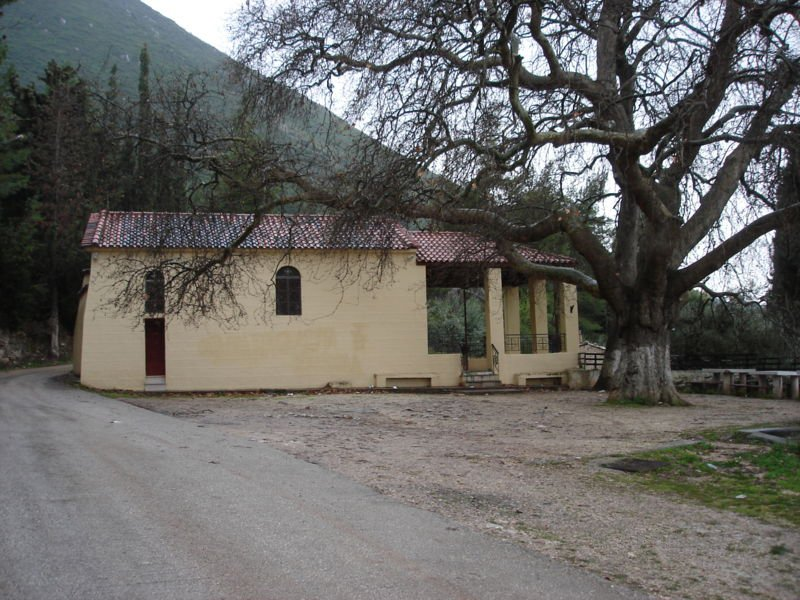 Agios Konstantinos Krini Village Greece